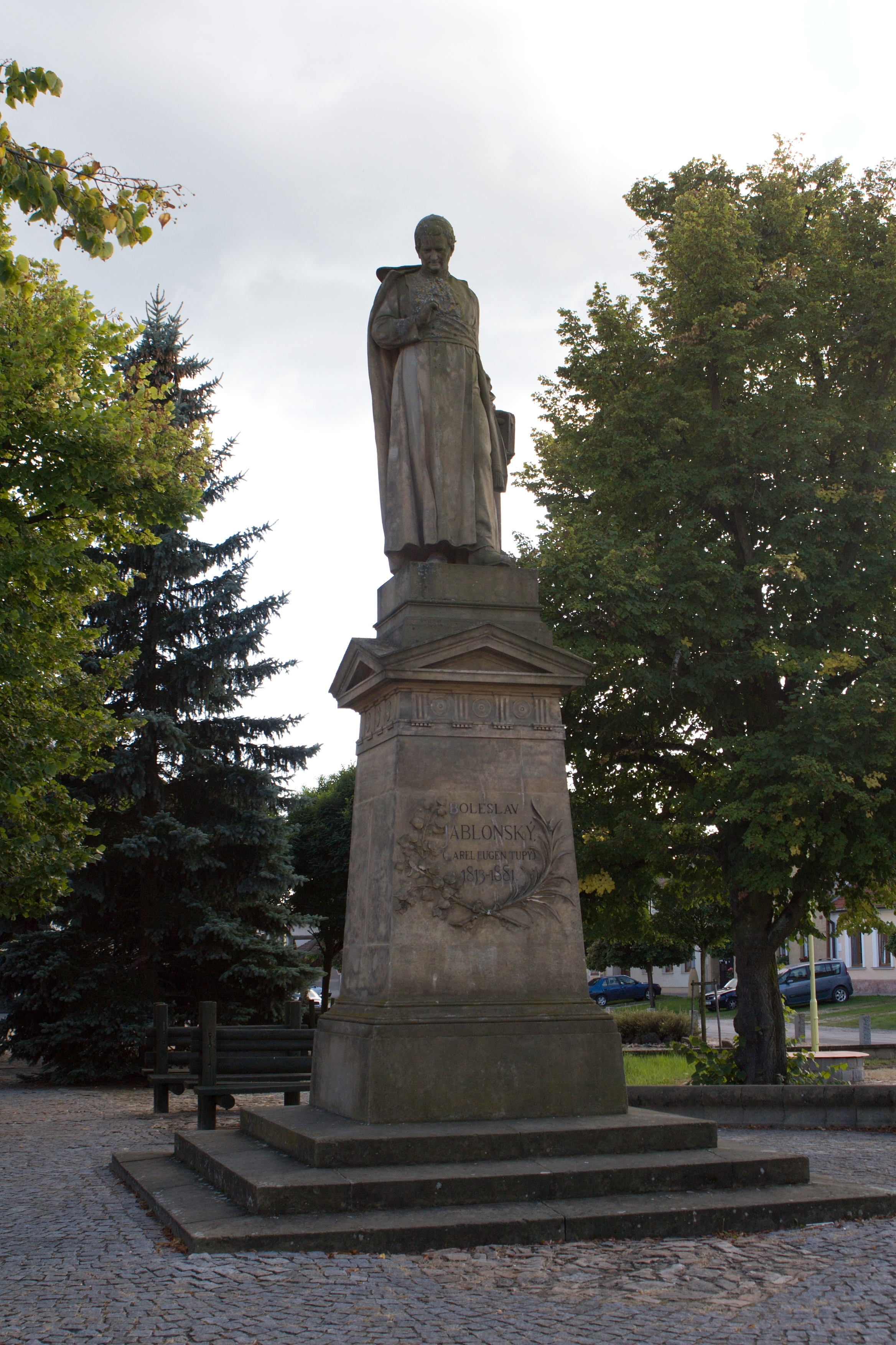 Pomník Boleslava Jablonského (Kardašova Řečice), Jablonského nám., Kardašova Řečice